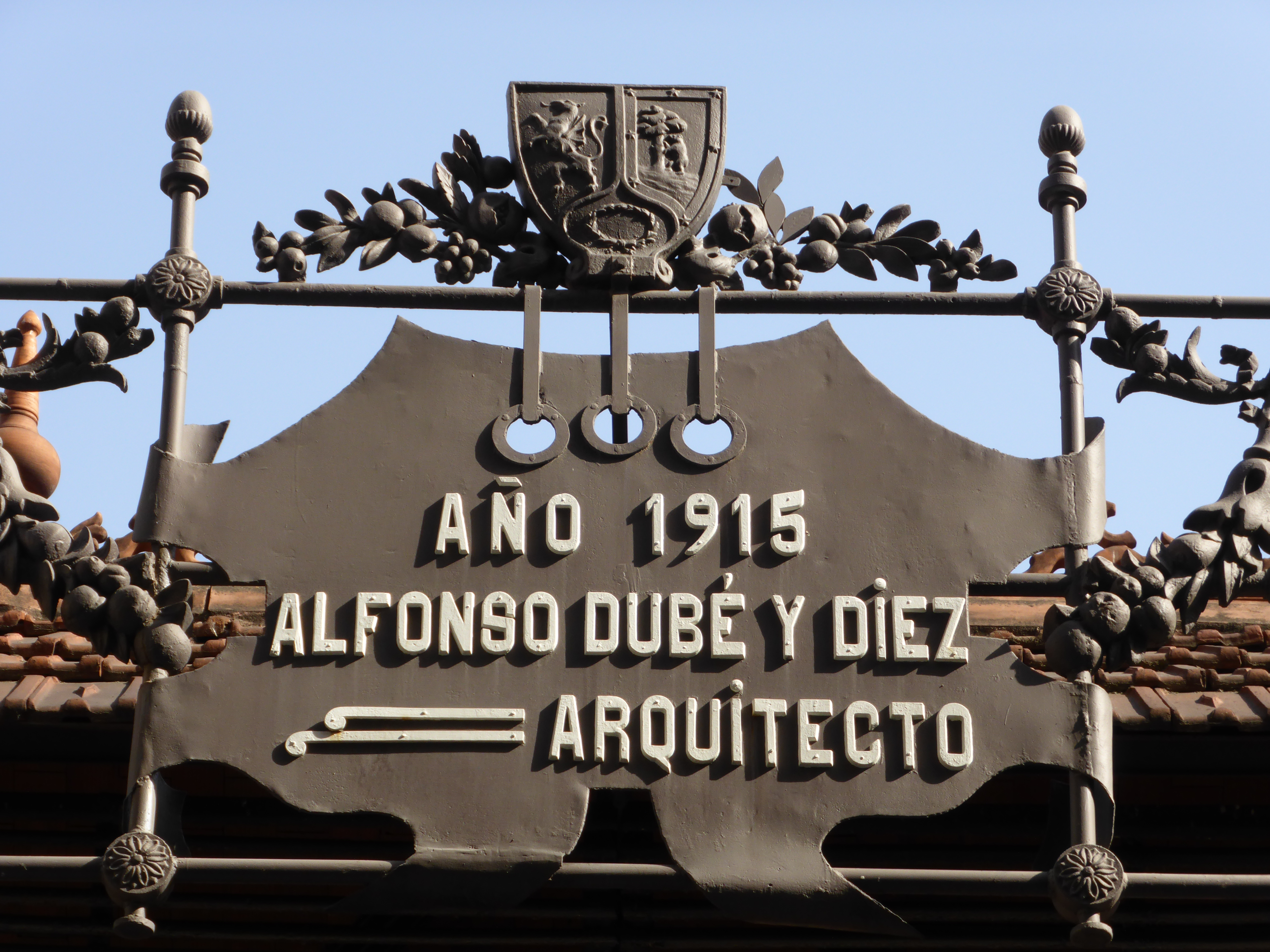 Rótulo con el nombre del arquitecto autor del mercado, y fecha de construcción en 1915.